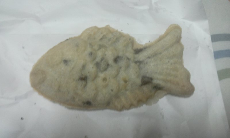 붕어빵입니다